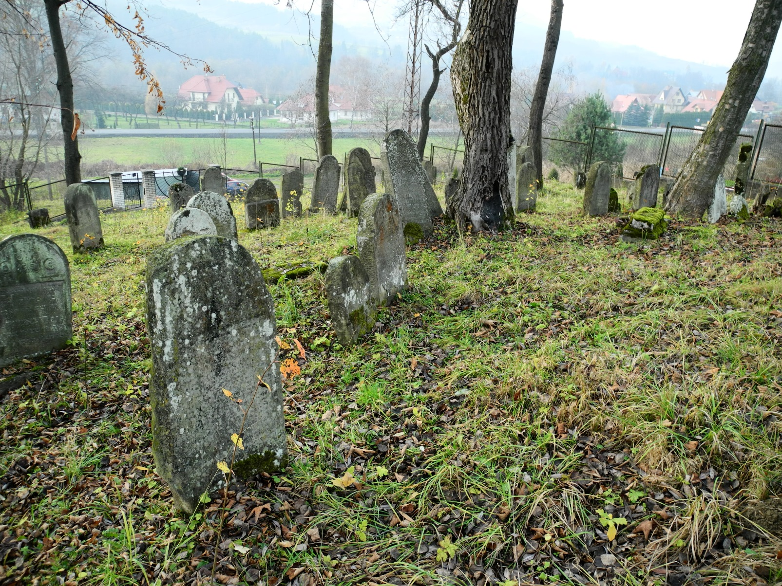 Mszana Dolna, cmentarz żydowski